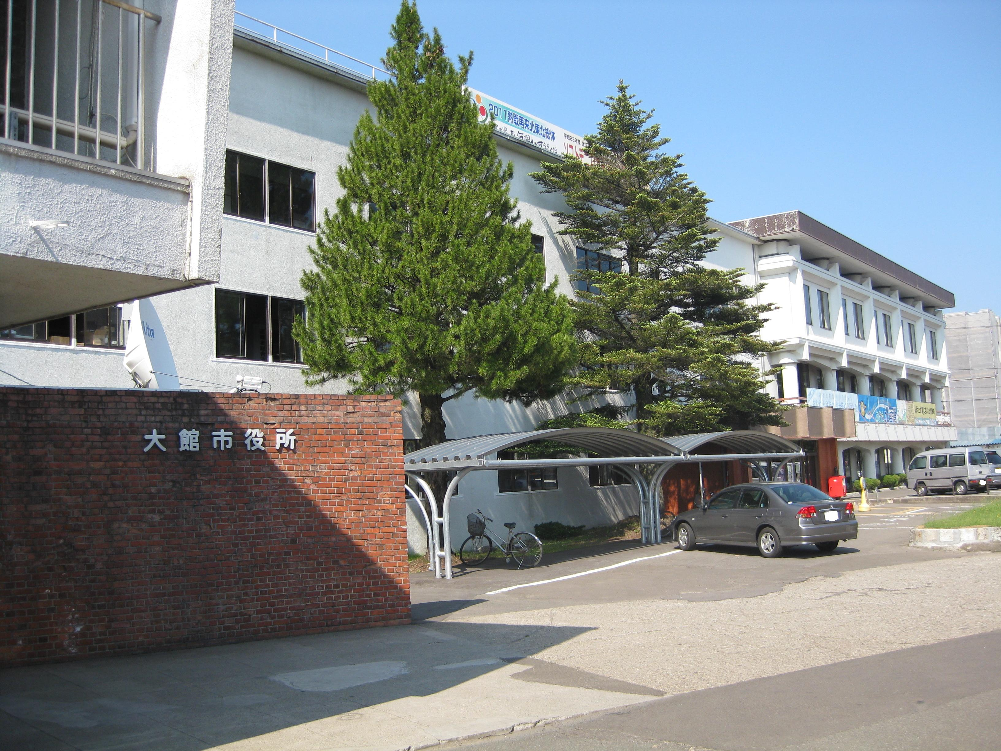 大館市役所